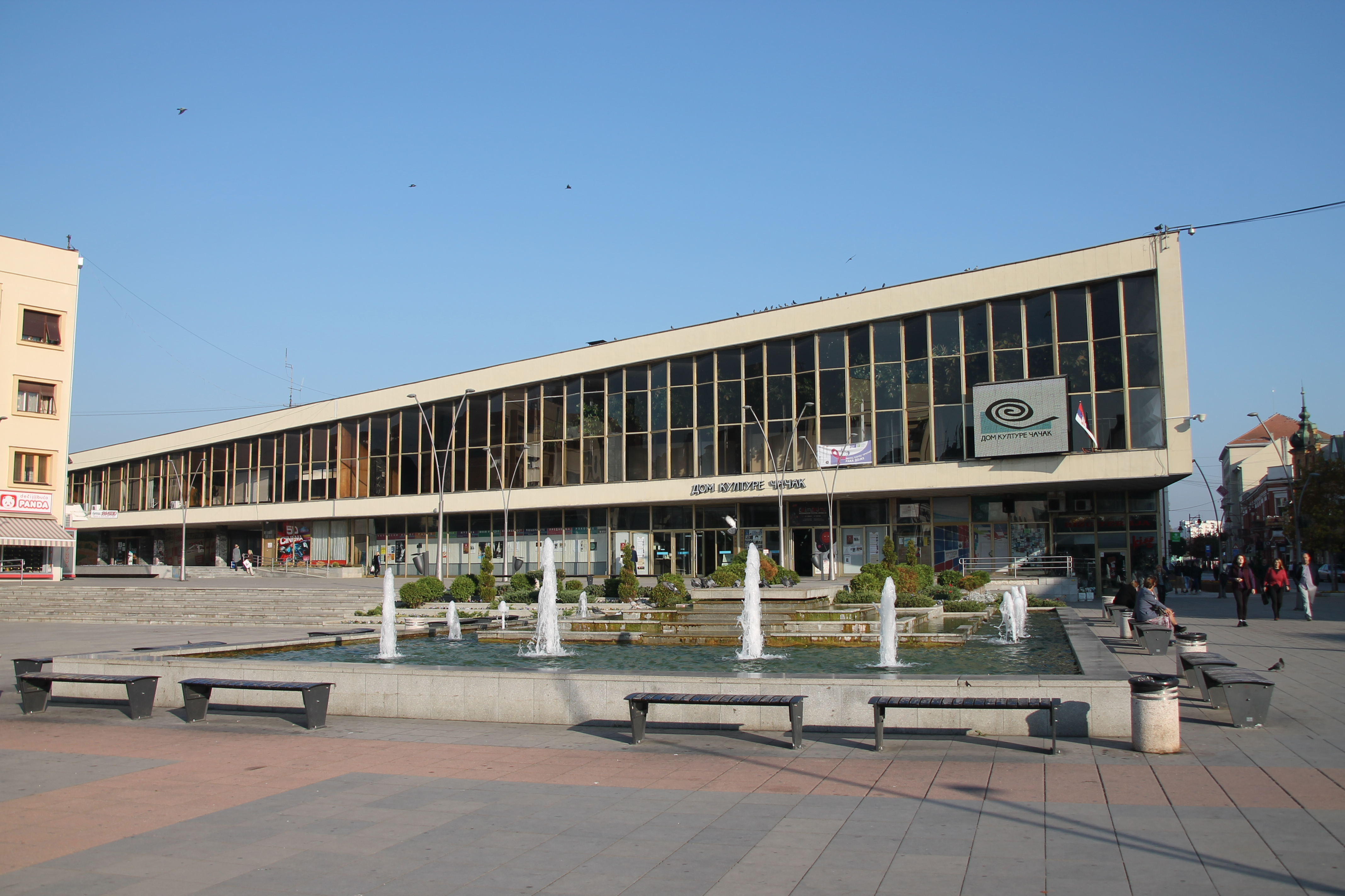 Građevine u Čačku